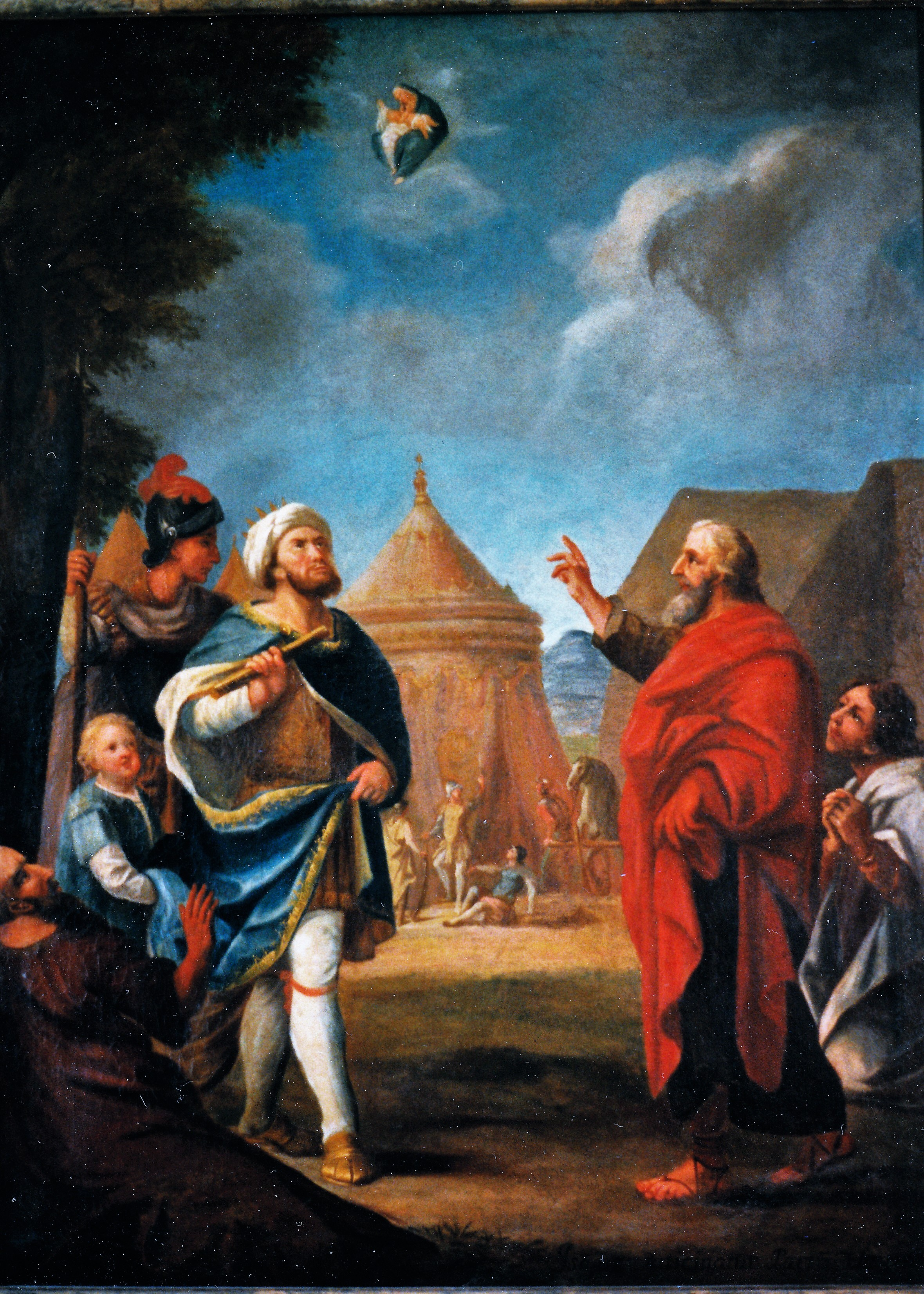 Kreuzgang im Kloster Ottobeuren - Jesaja prophezeit Ahas die Geburt des Immanuel aus einer Jungfrau (Jes 7,14) (1722)